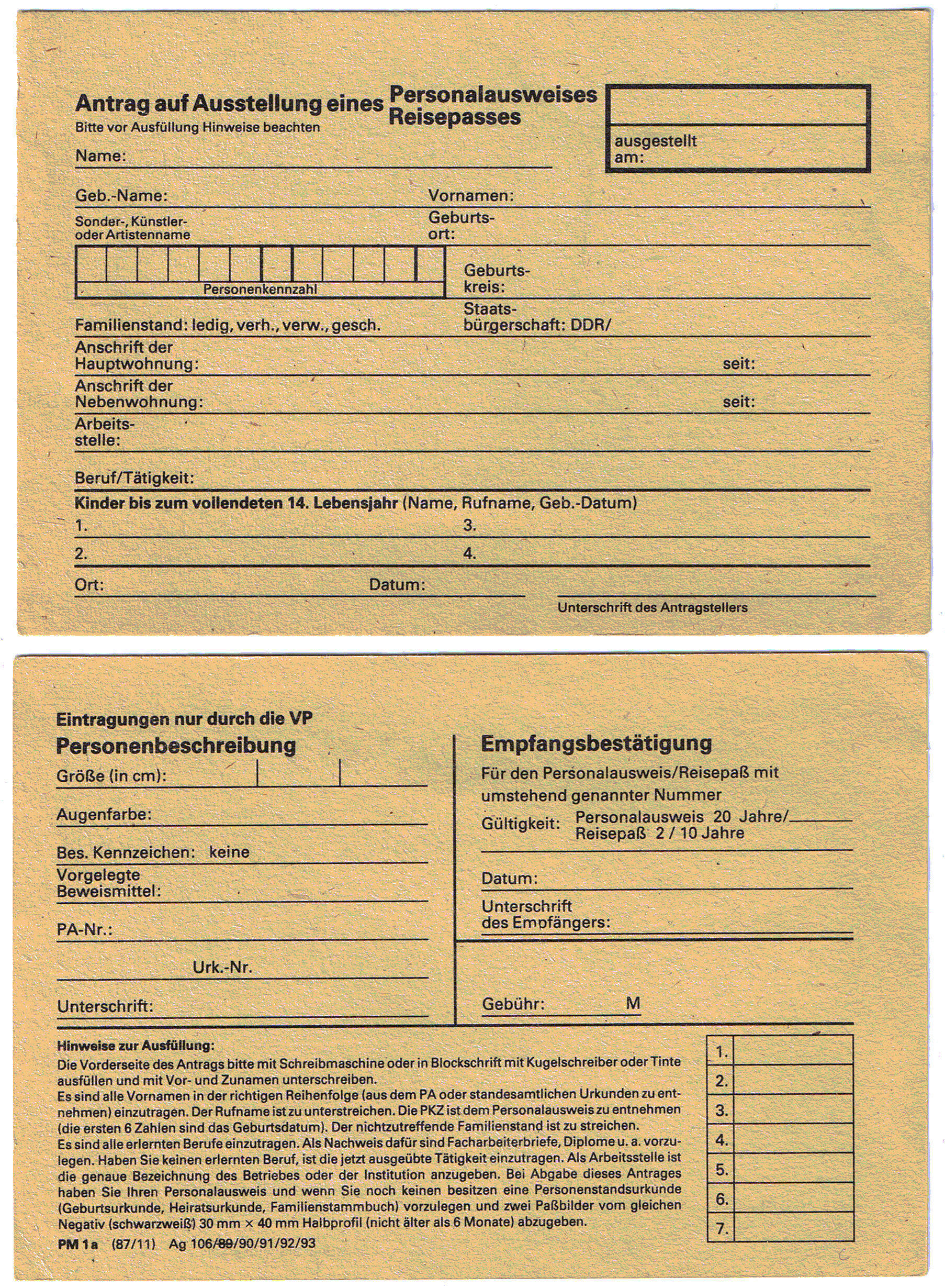 Antragsformular und Stammkarte zum Personalausweis der DDR, bzw. zum Reisepass der DDR